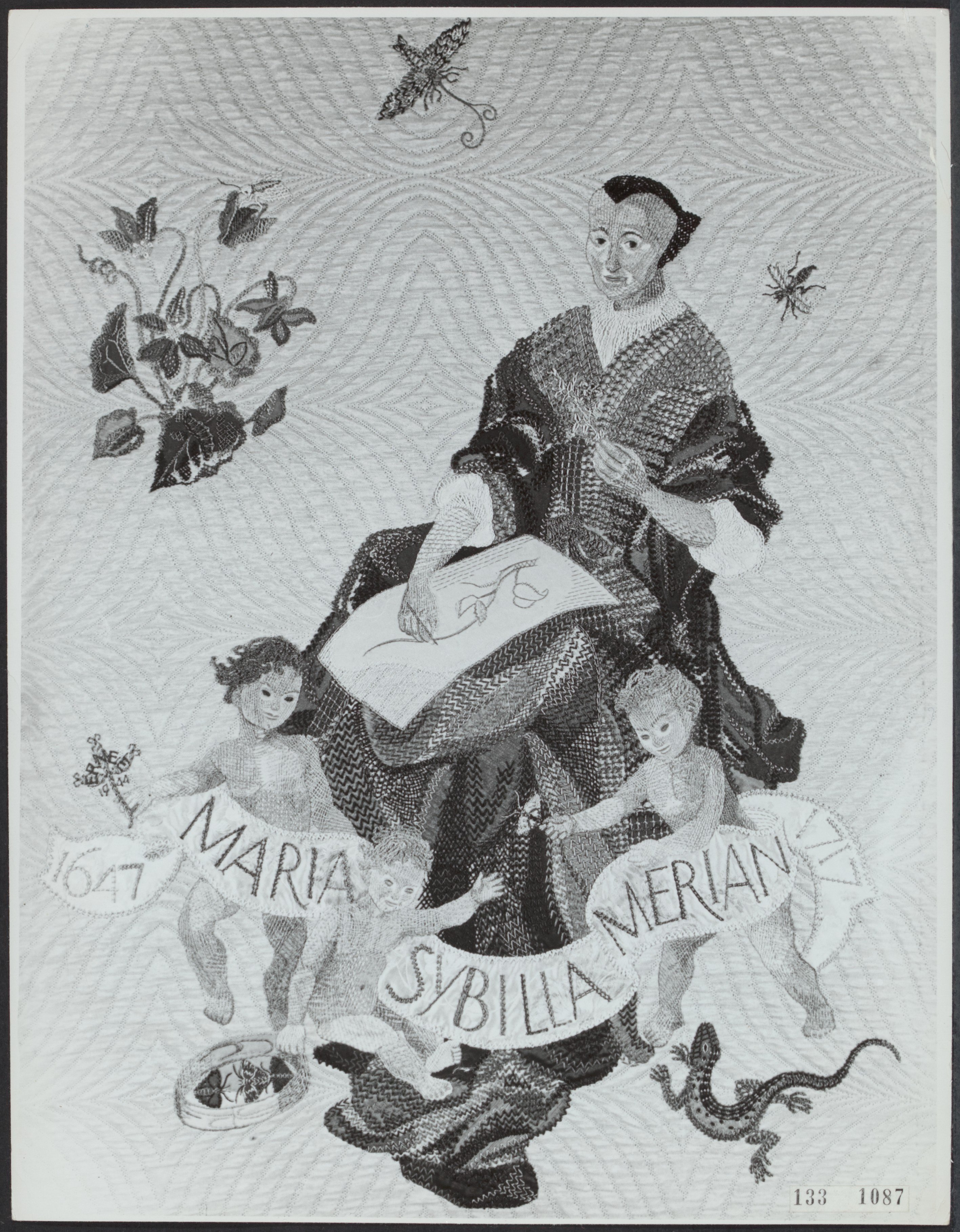 'Maria Sybilla Merian': borduursel met zijde-applicaties van Ernee 't Hooft (1911-2004)